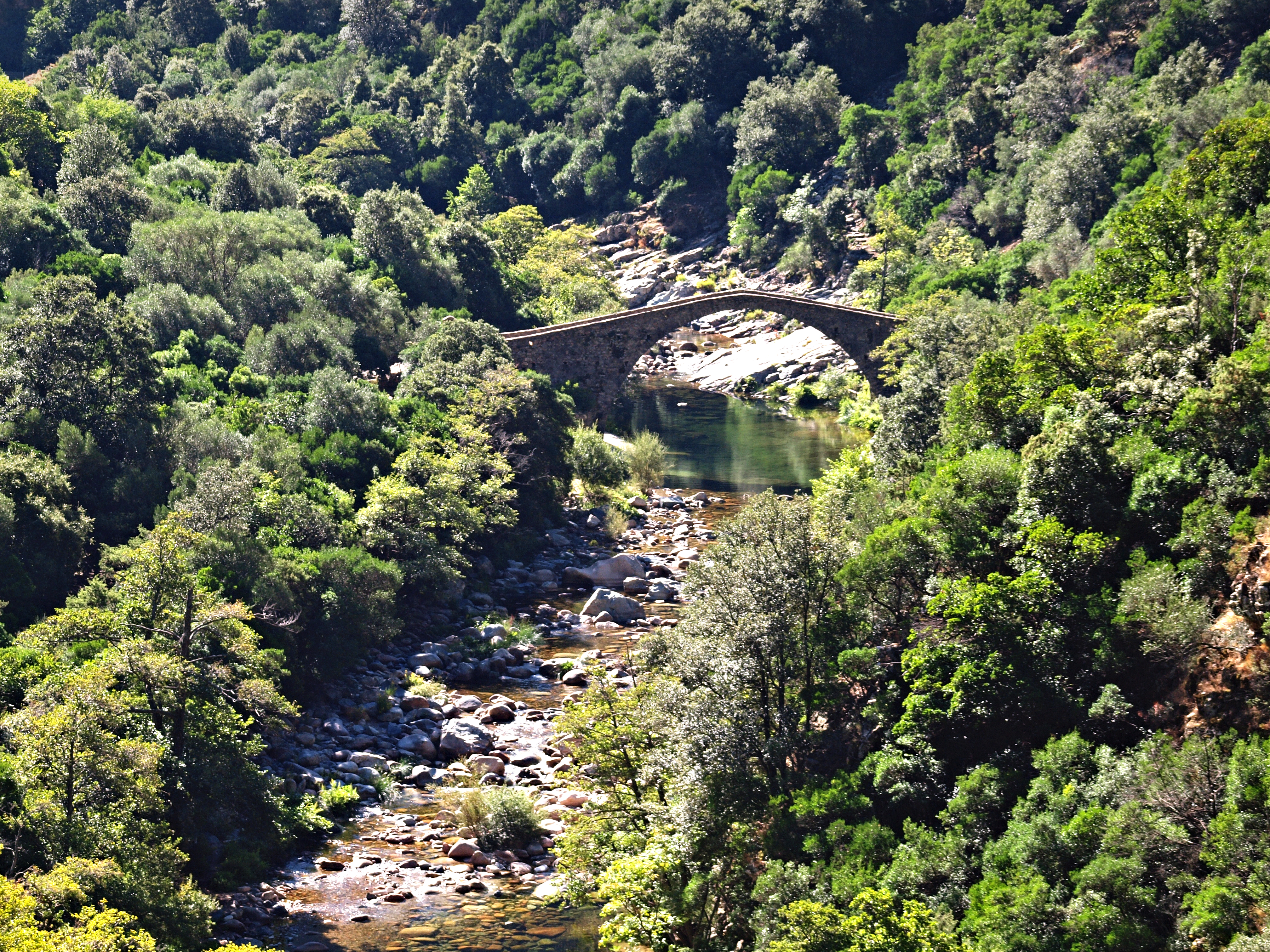 Ota (Corsica) - Pont génois de Pianella sur la rivière Porto